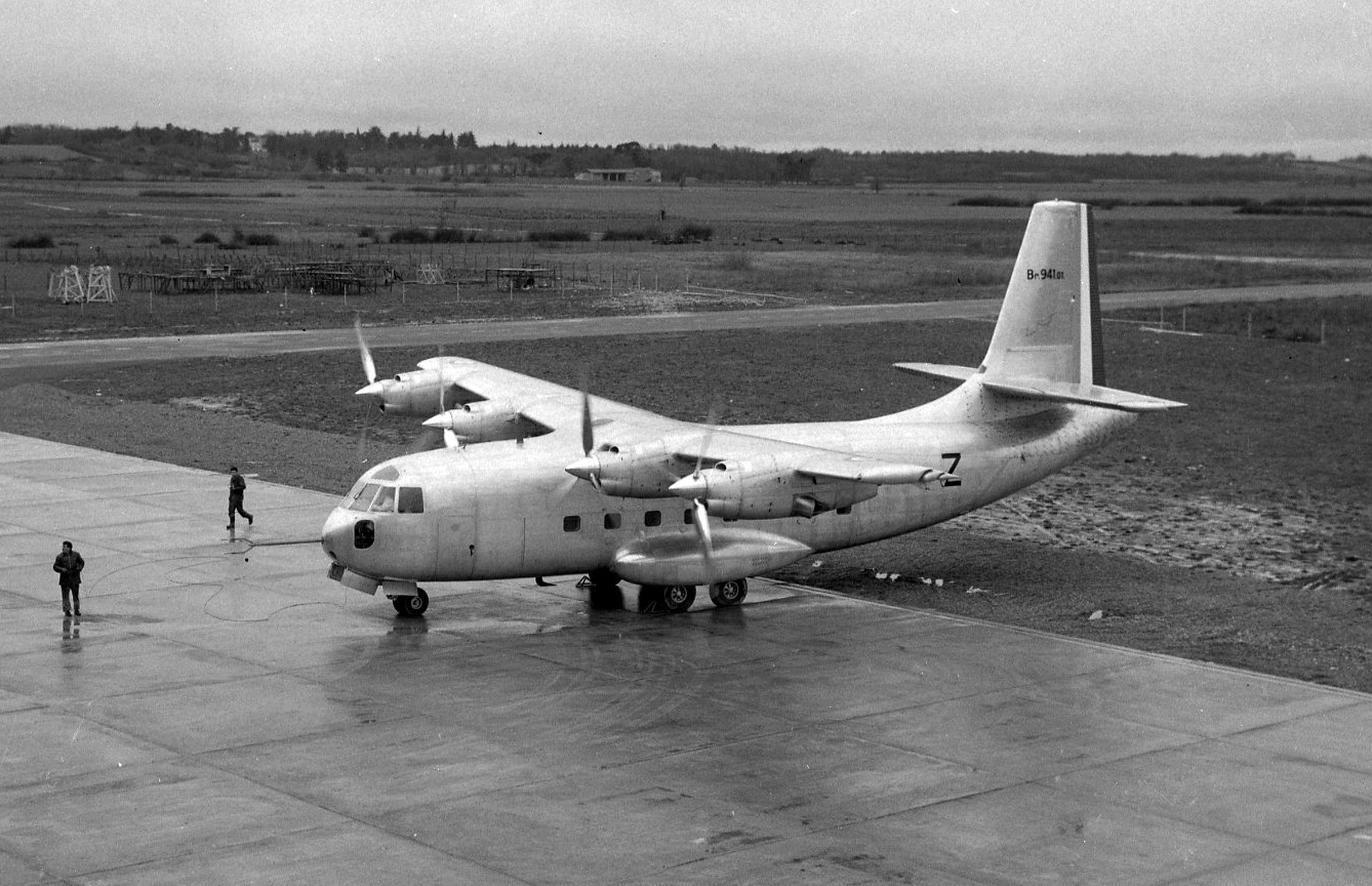 Pistes de Blagnac. 4 février 1962. Vue d'ensemble en plongée de l'avion militaire Bréguet 941 stationné sur piste (dalle).